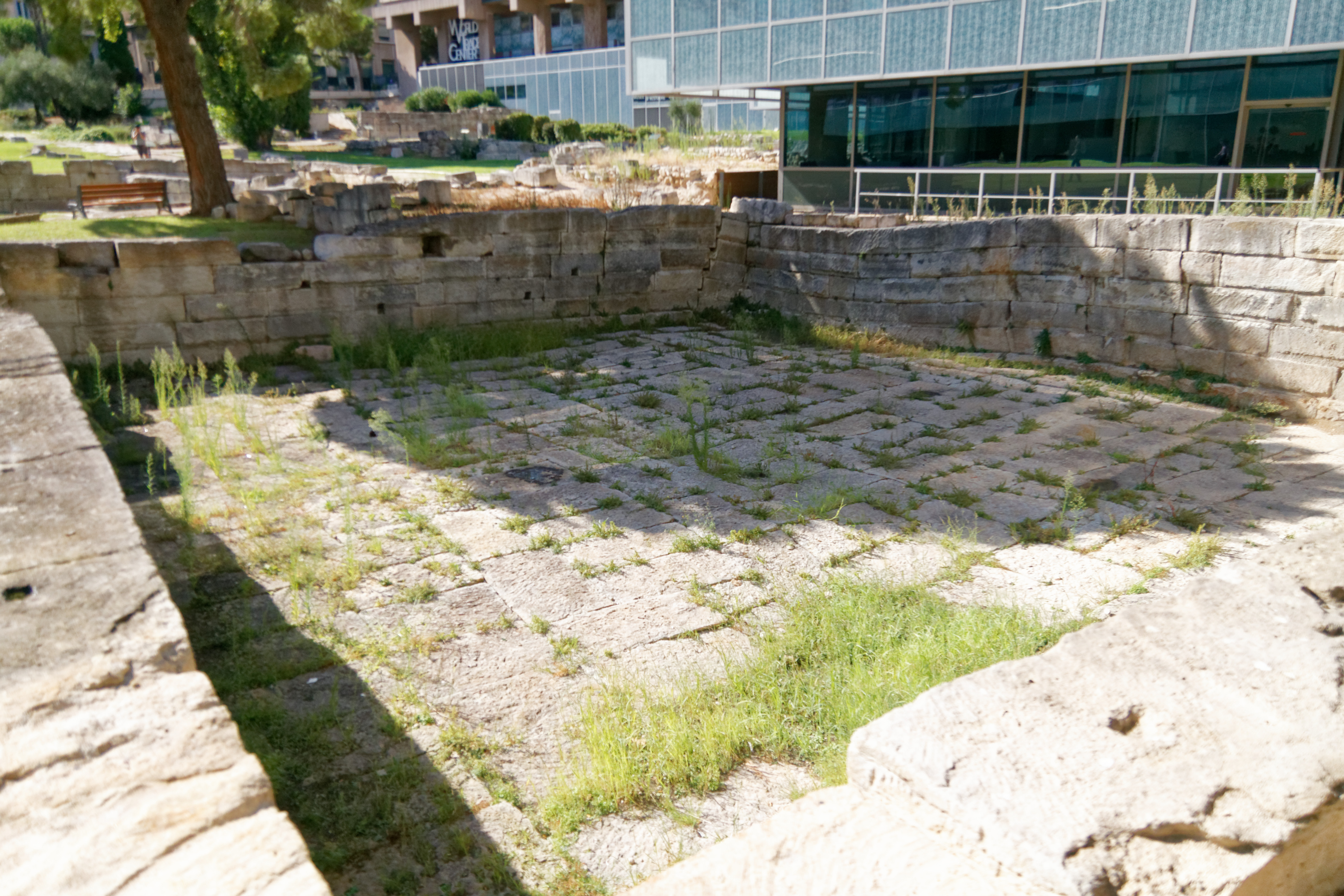 Jardin des Vestiges in Marseille, antikes Süßwasserbecken